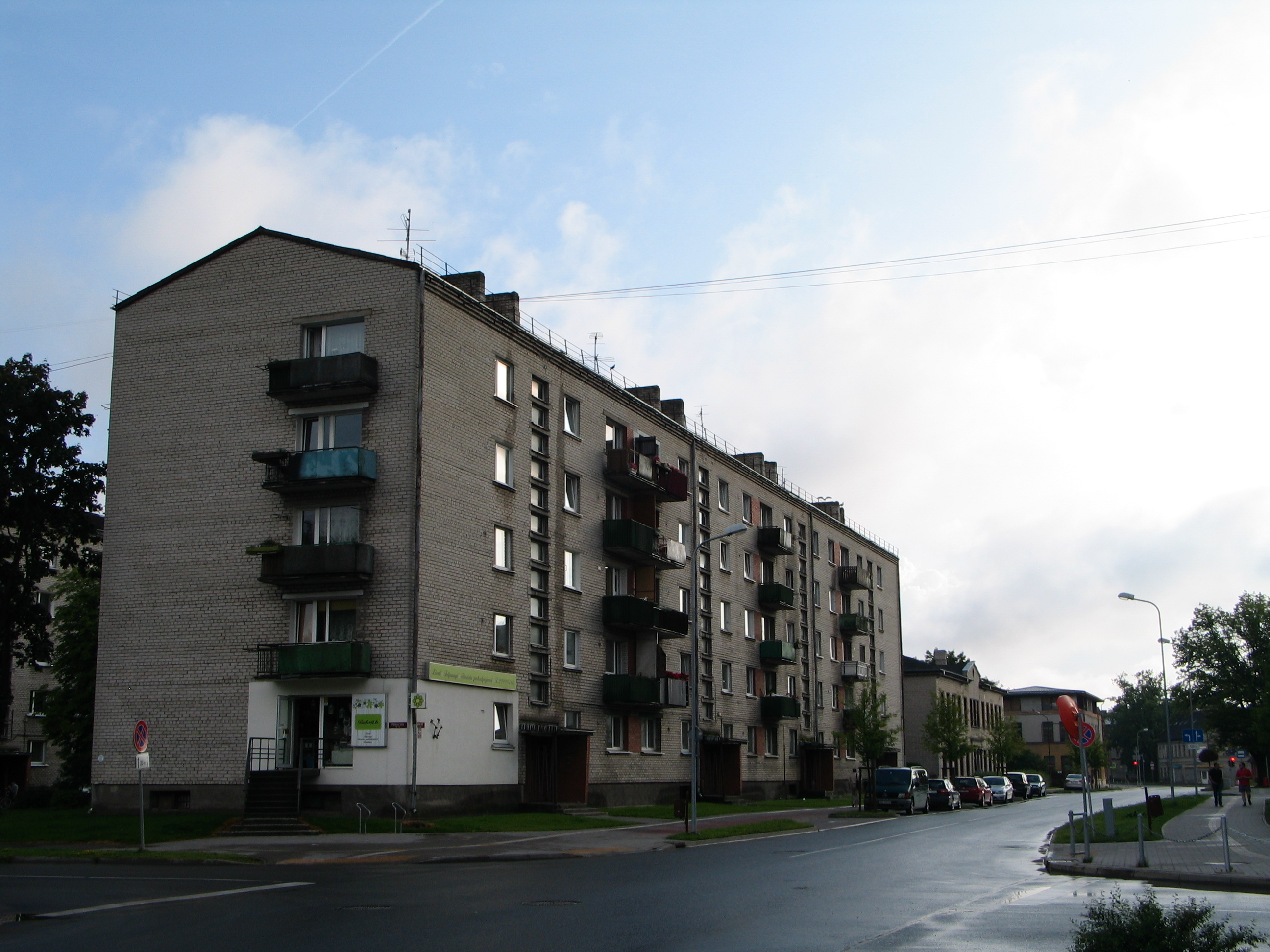 Raiņa iela 21, Jelgava